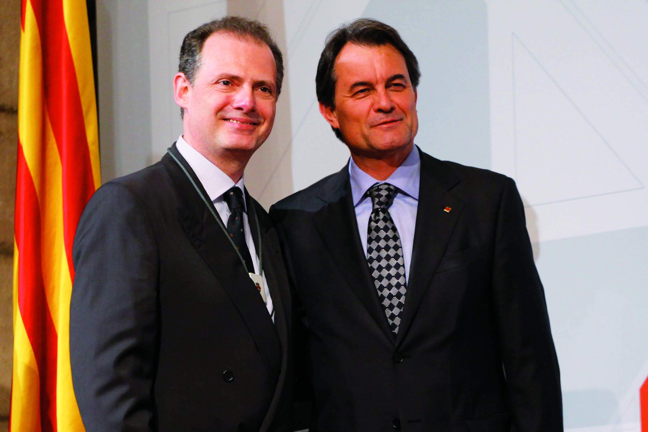 Stefano Grondona recibió la Creu de Sant Jordi